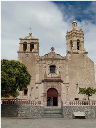 Templo religioso en el pueblo de Mazapil